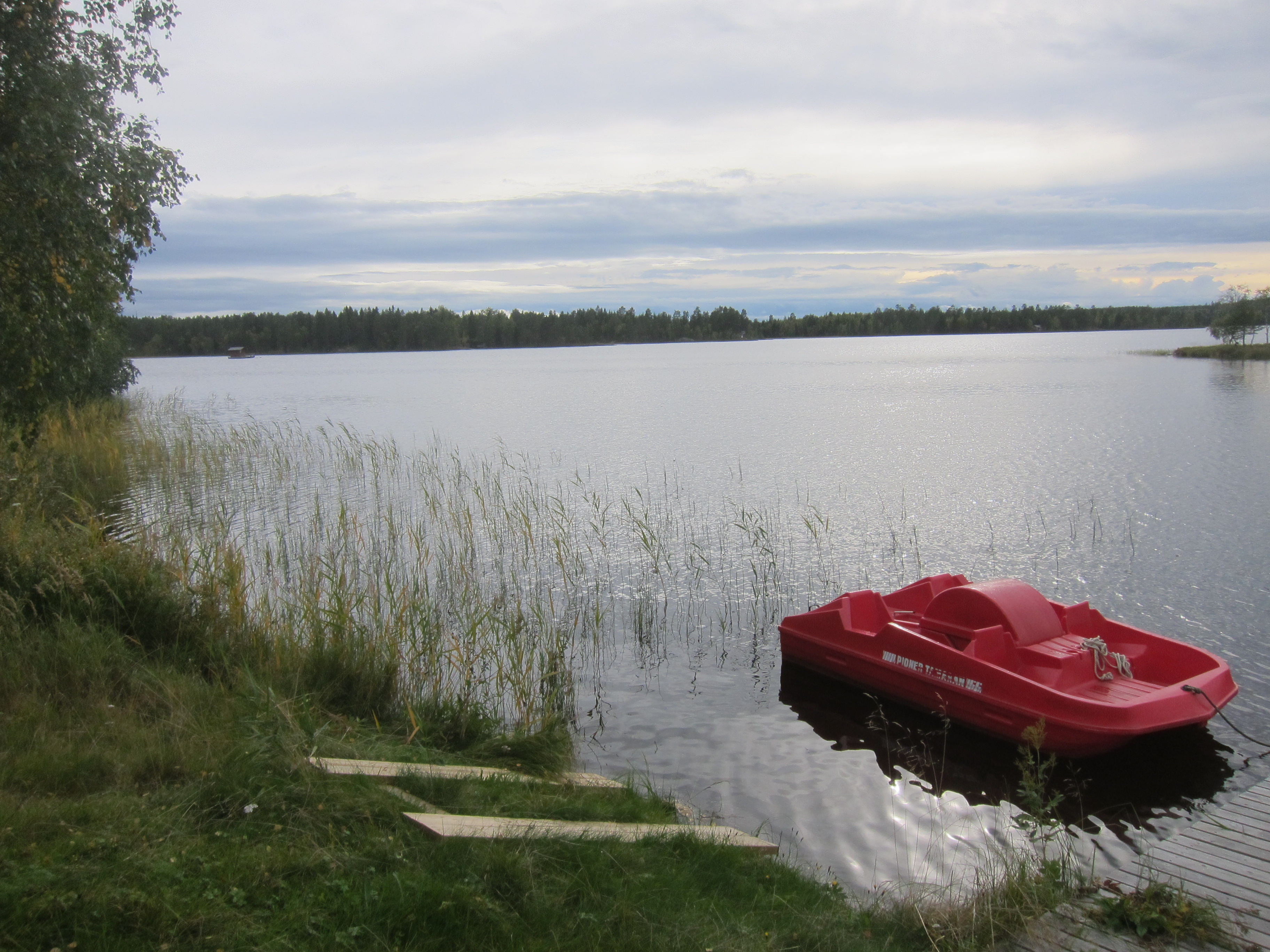 Bjännsjön i Umeå kommun